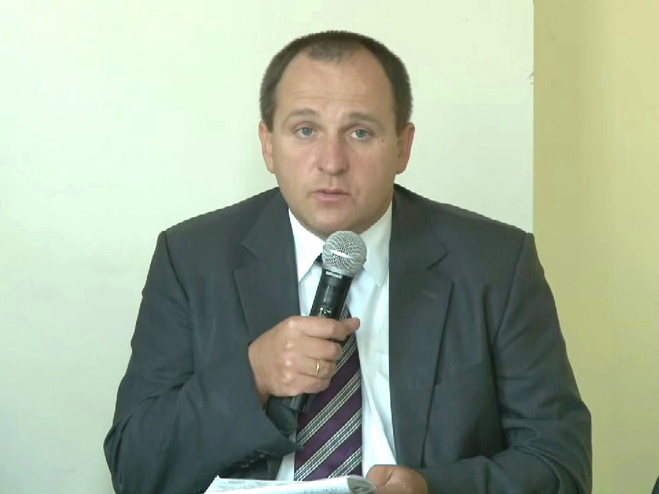 Stanisław Kluza, ekonomista.